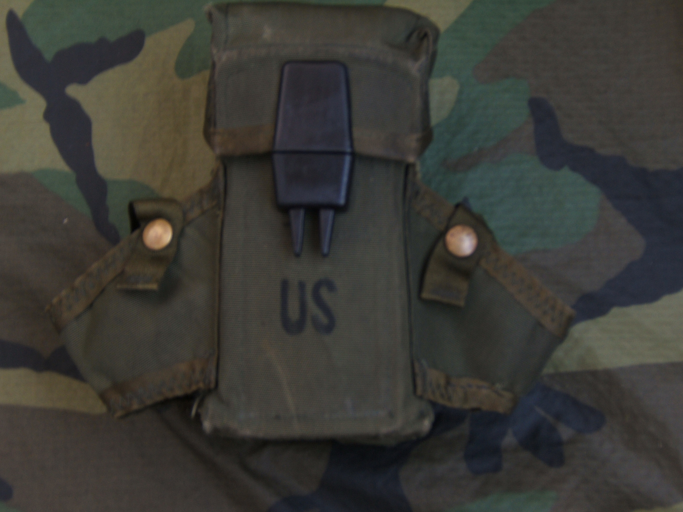 Ładownica na amunicję do broni lekkiej